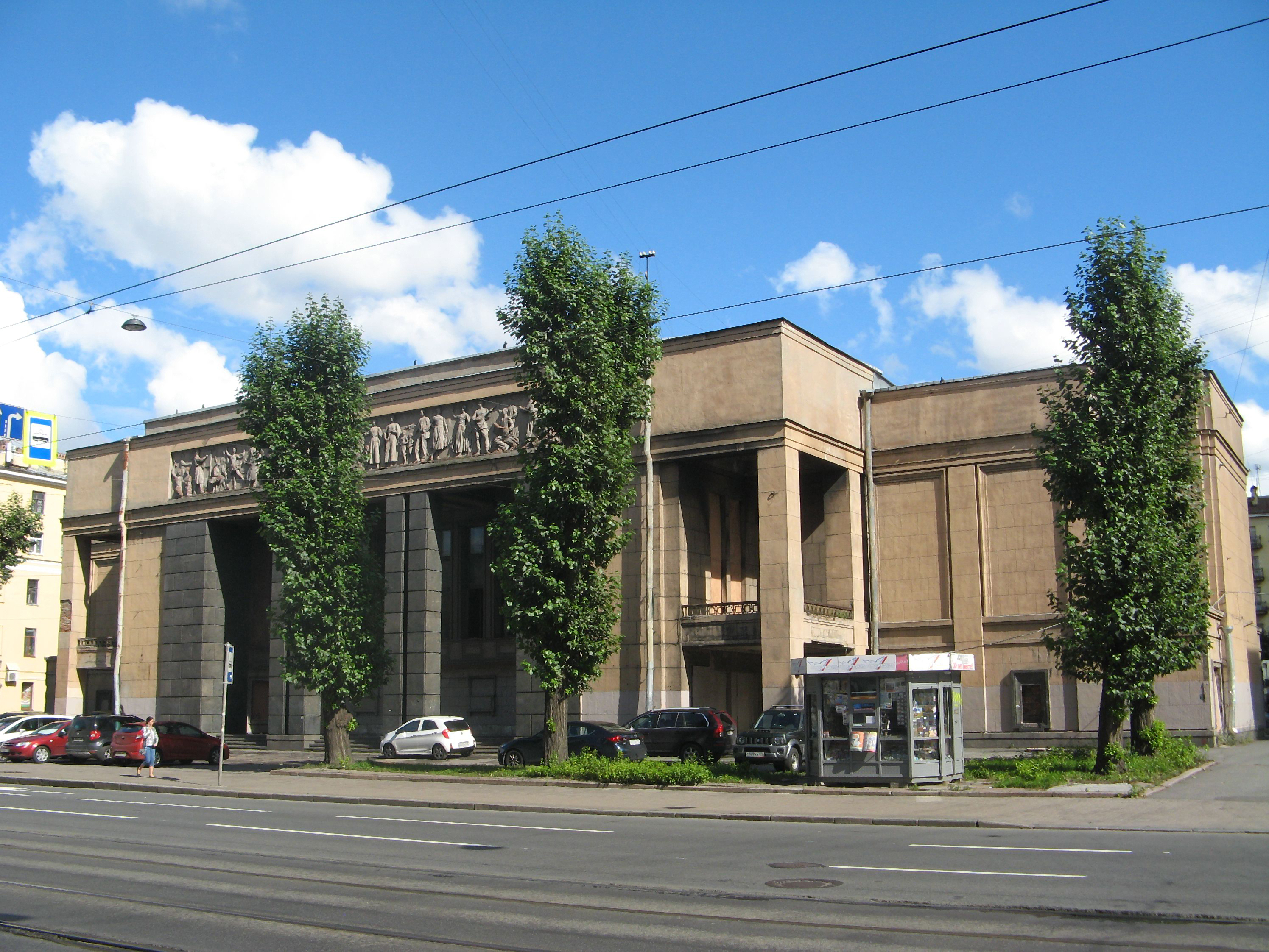 Здание кинотеатра 'Москва': Старо-Петергофский проспект, 6, Адмиралтейский район, Санкт-Петербург